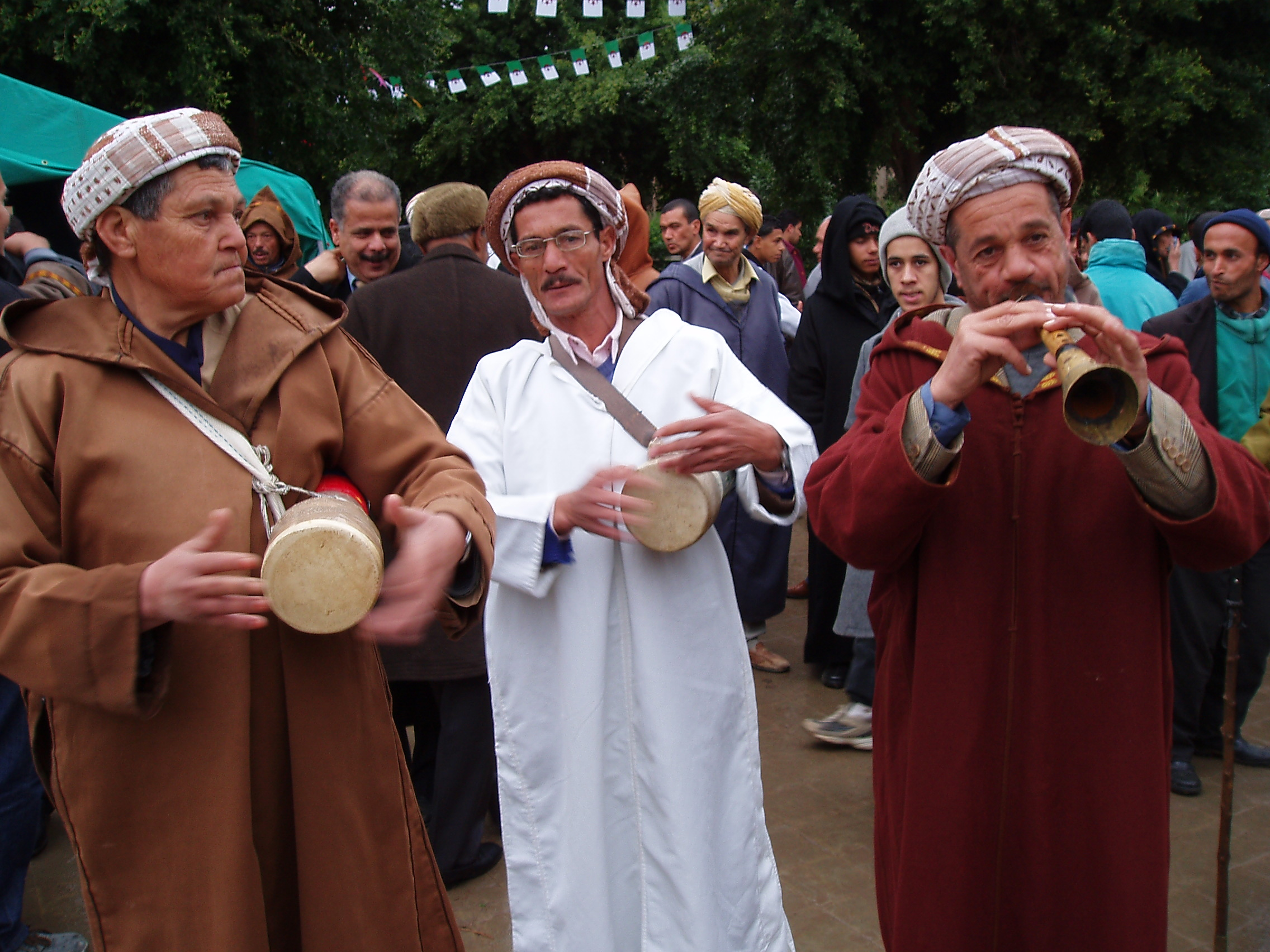 Groupe de musiciens Glayliya nord algérie ouest This is an image of Cultural Fashion or Adornment from Algeria